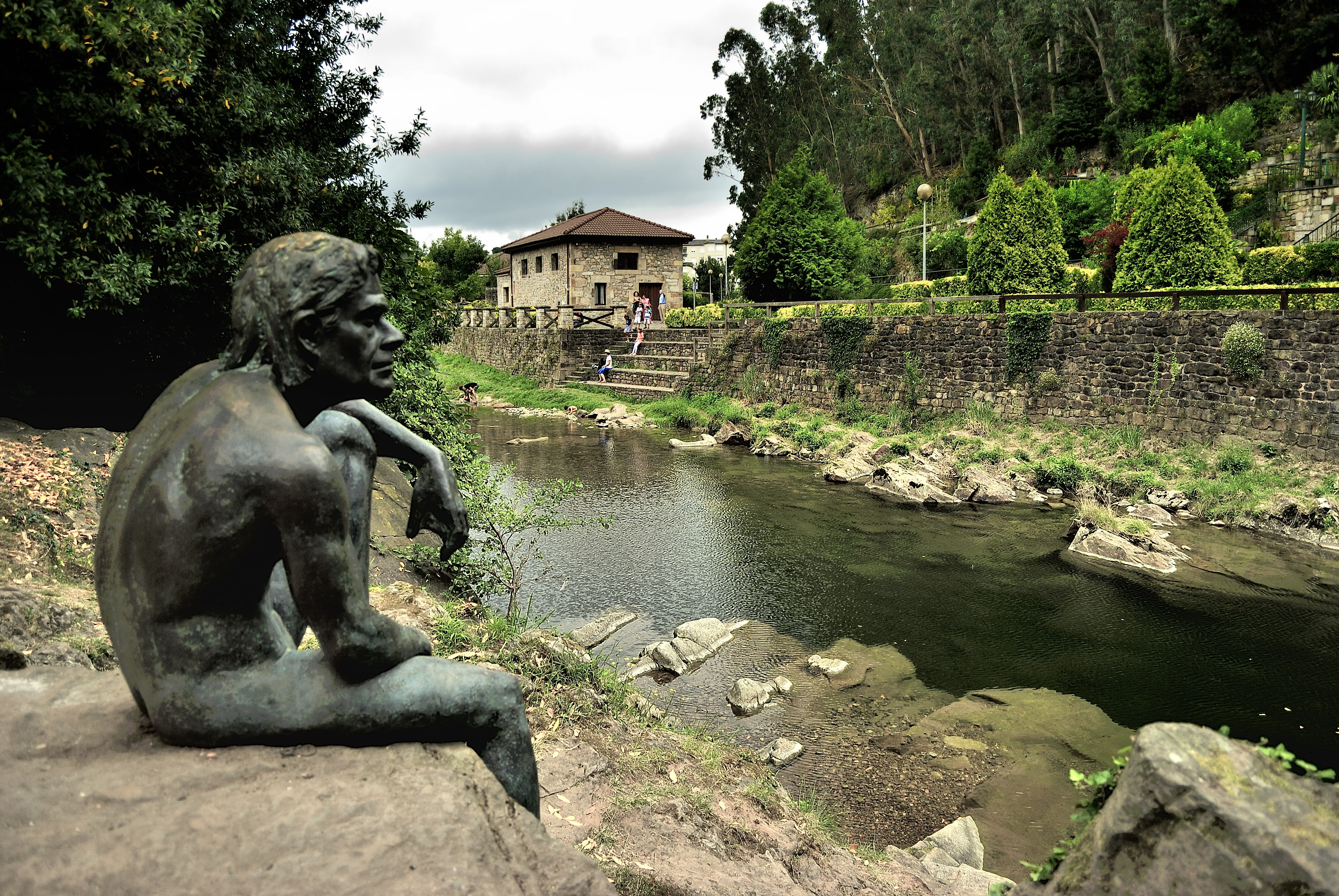 Rio Miera a su paso por Lierganes-Leyenda del Hombre Pez This is a photography of a Site of Community Importance in Spain with the ID: ES1300015. Natura2000 entry, EEA entry